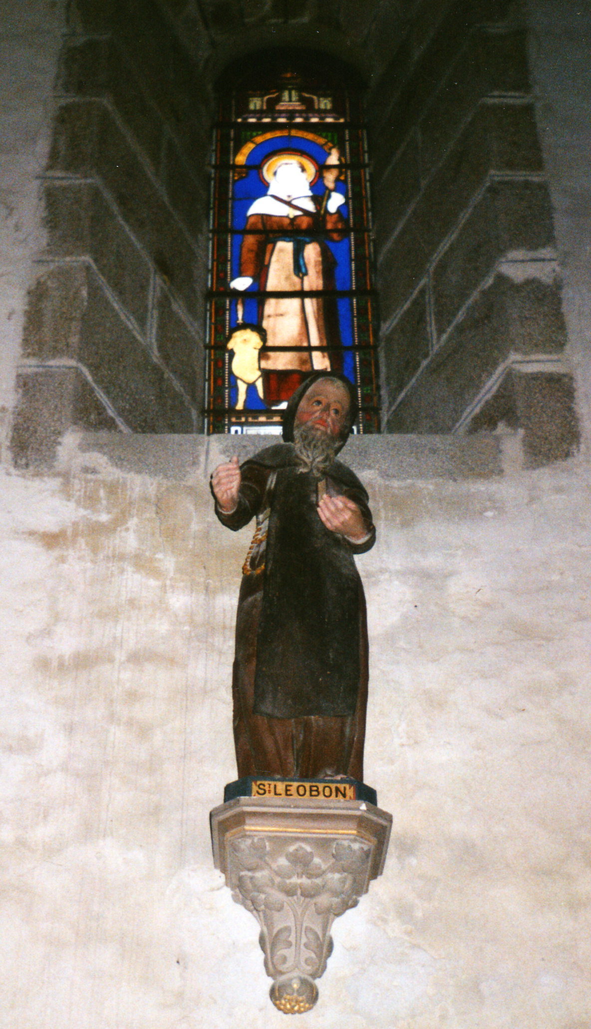 Statue de Saint Léobon dans l'église de Saint-Etienne-de-Fursac.